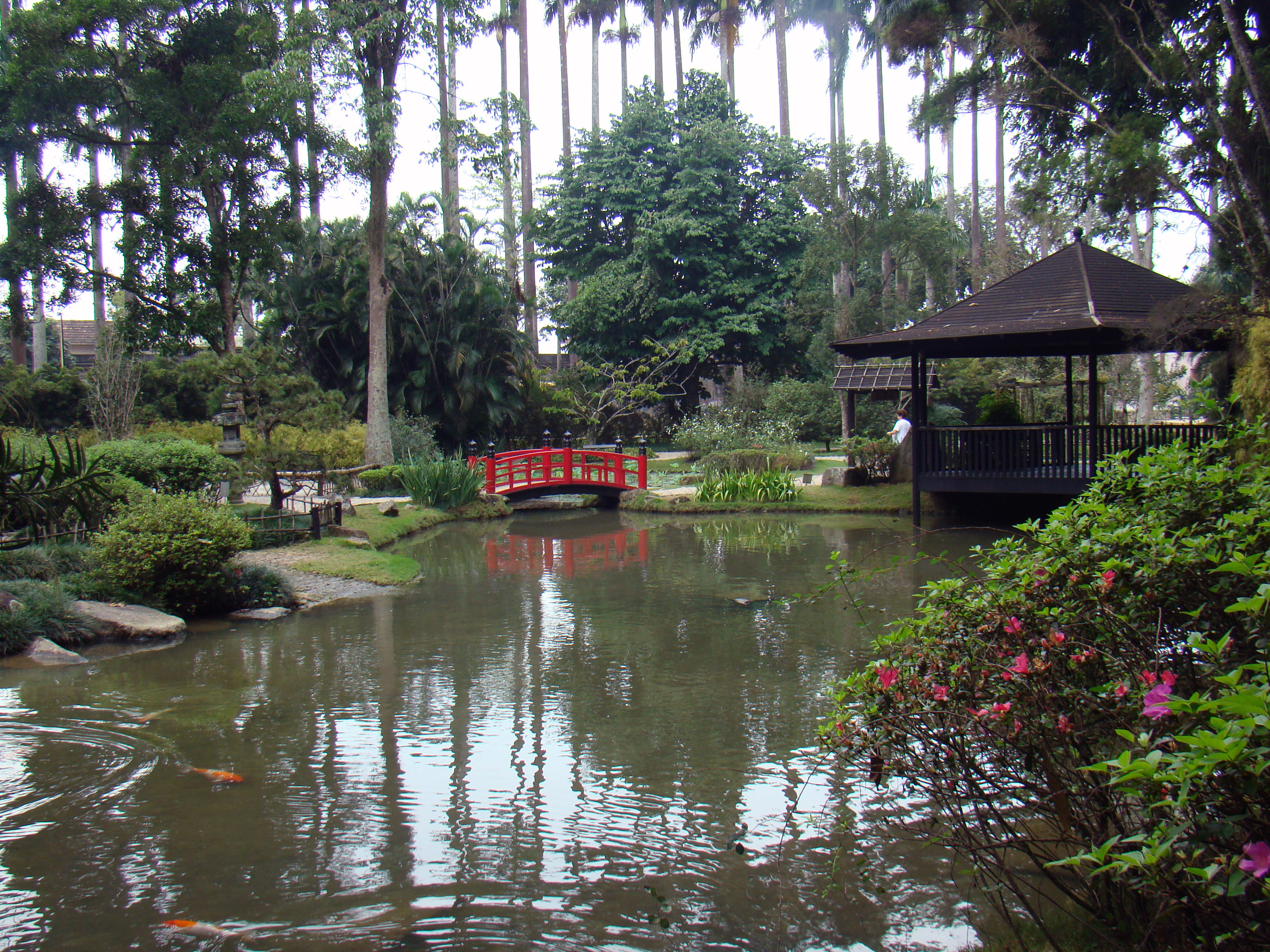 Criado em 1935, a partir de uma doação de sessenta e cinco espécies de plantas típicas do Japão, feita pela Missão Econômica Japonesa, que à época visitou o Brasil. Reinaugurado em 1995, apresenta ao visitante um típico recanto nipônico, com um jardim de pedras, e exemplares de bonsais, bambus, cerejeiras, buquês de noiva e salgueiros-chorões. Nos dois lagos, habitados por carpas, destacam-se flores de lótus.